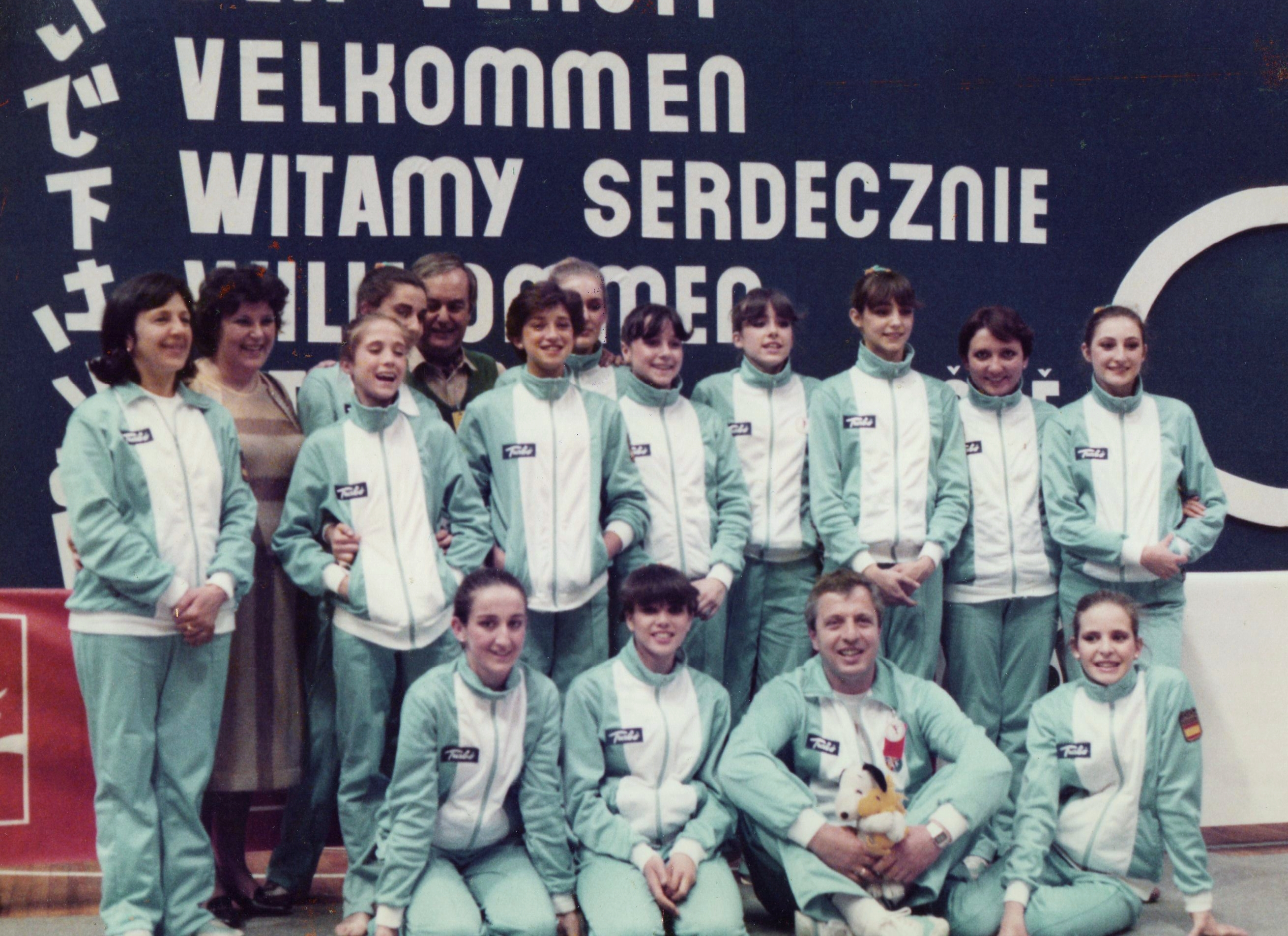 La selección nacional de gimnasia rítmica de España en la Final de Copa del Mundo en Belgrado (1983). Arriba, de izquierda a derecha: Emilia Boneva (seleccionadora), Violeta Portaska (pianista), Marta Bobo, Virginia Manzanera, Pepe García (padre de Elena García), Eva Alcaraz, Elena García, Pilar Domenech, Victoria García, Sonia Somoza, Ana Roncero (entrenadora) y Dolores Tamariz. Abajo, de izquierda a derecha: María Fernández Ostolaza, Isabel García, Georgi Neykov (coreógrafo) y Susana Guillén. Foto facilitada por María Fernández Ostolaza.